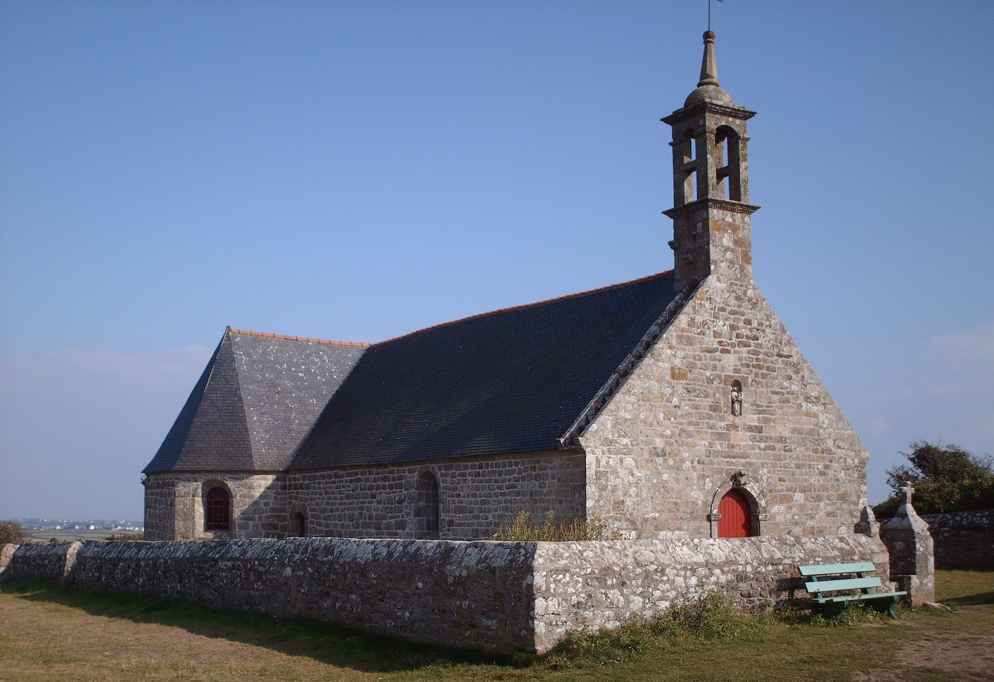 Chapelle Notre-Dame de Bon Voyage